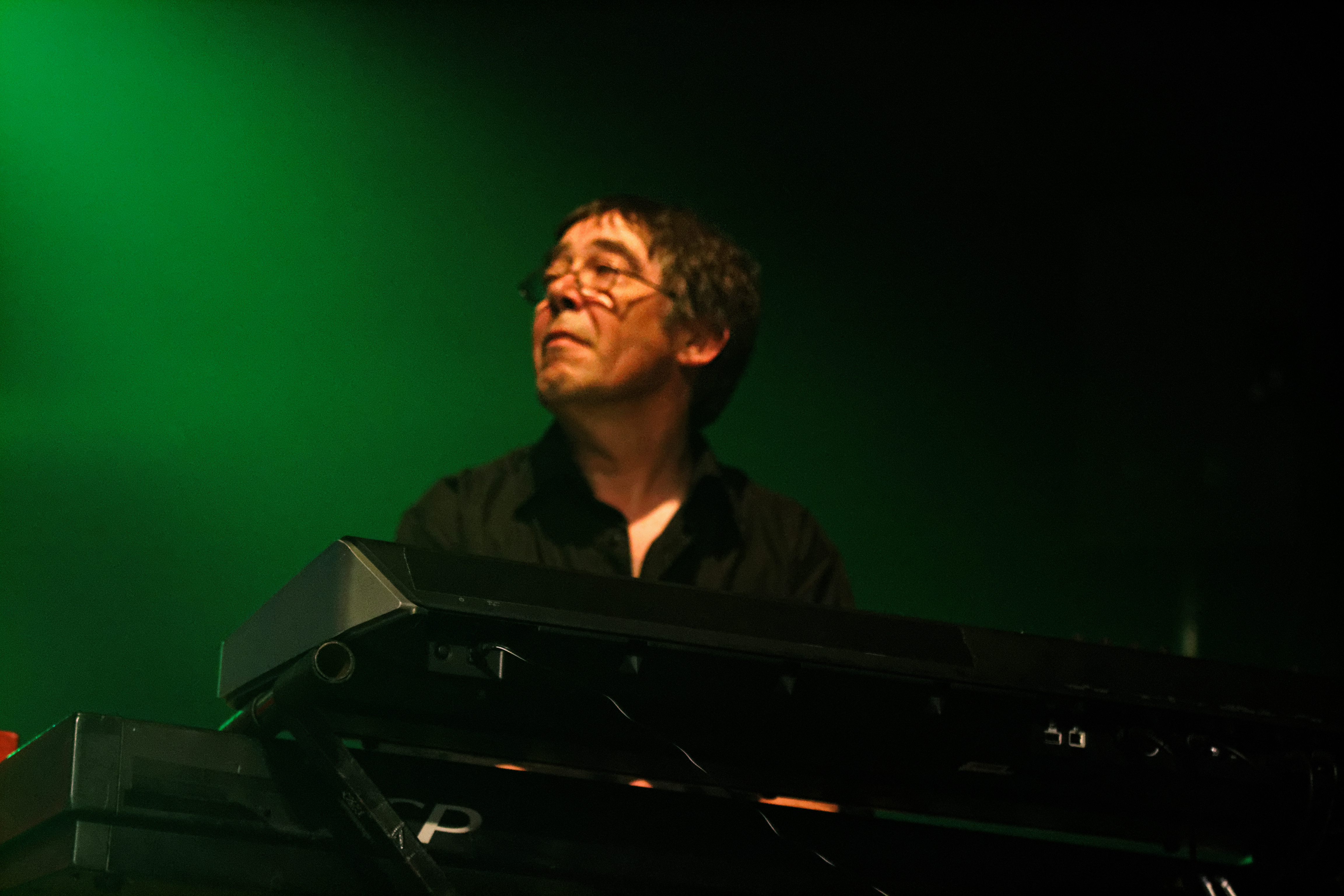 Patrick Péron en concert avec Dan Ar Braz et le bagad Kemper à l'espace Gradlon lors du festival de Cornouaille 2013, à l’occasion des 90 ans du Cornouaille et des 20 ans de la création de l’Héritage des Celtes.